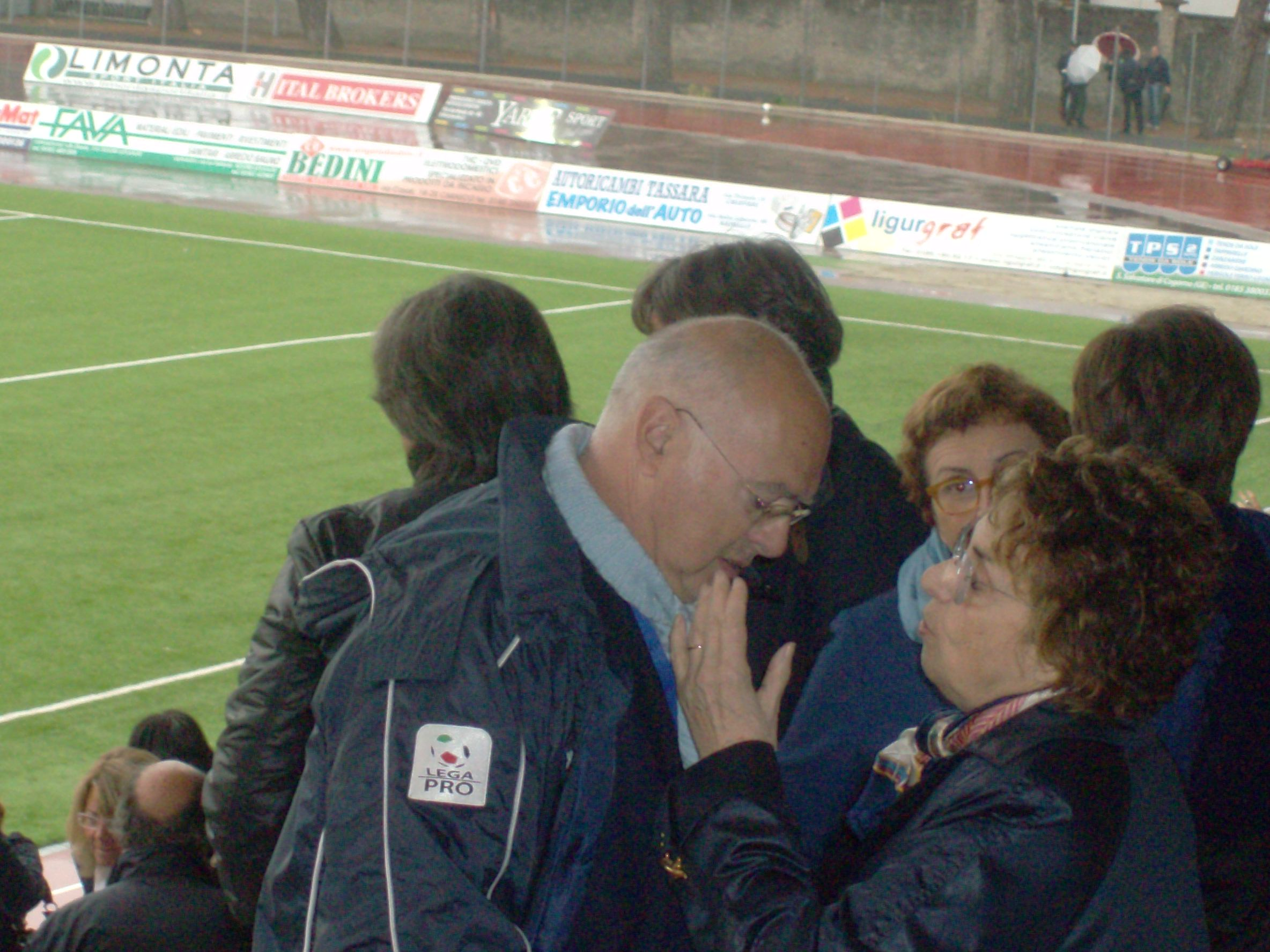 Fernanda Contri con Antonio Gozzi, presidente della Virtus Entella